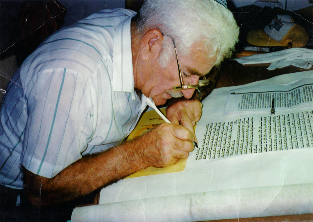 writing_a_torah.jpg הרב אריה עסיס כותב ספר תורה